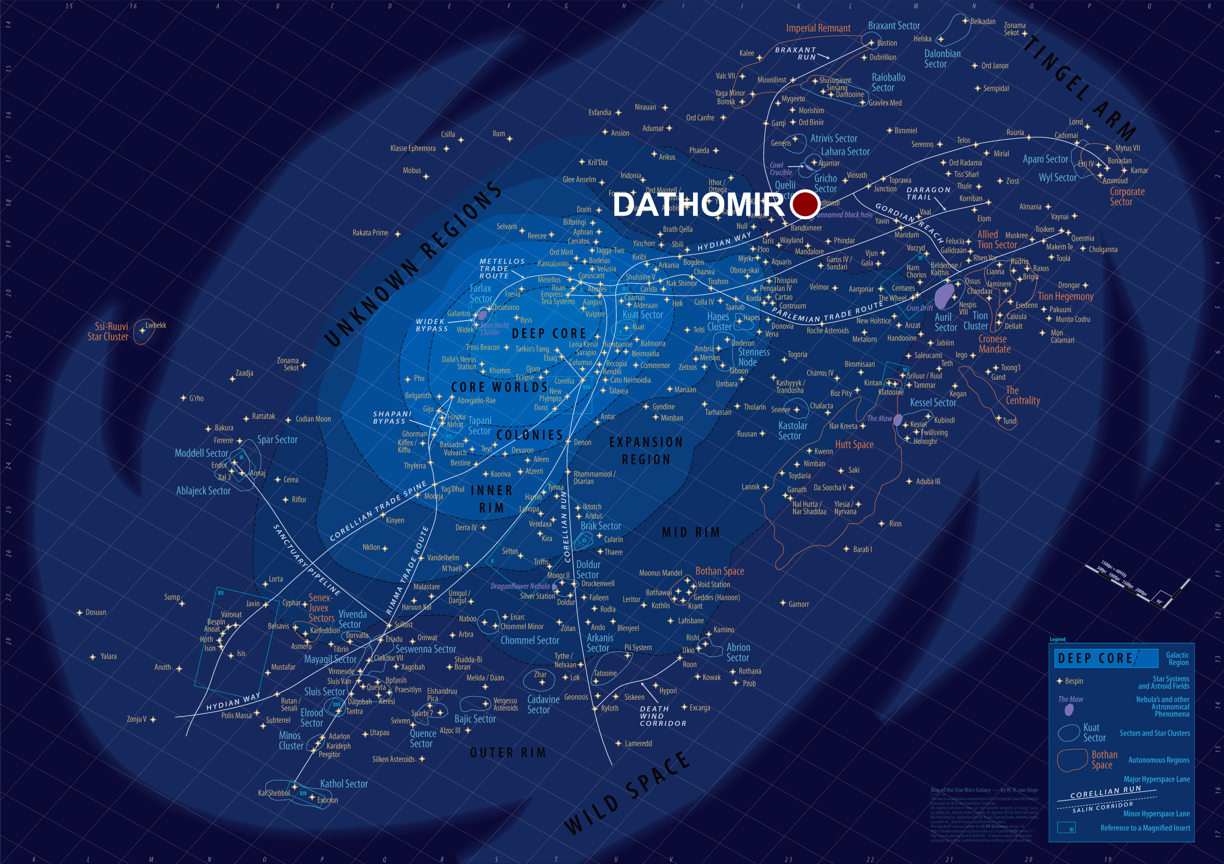 Localisation de Dathomir sur la carte Star Wars